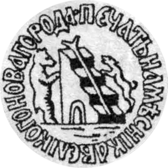 Печать новгородского наместника с Большой государственной печати Ивана Грозного.